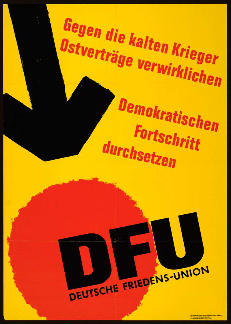 Plakat der Deutschen Friedens-Union zur Landtagswahl in Baden-Württemberg 1972